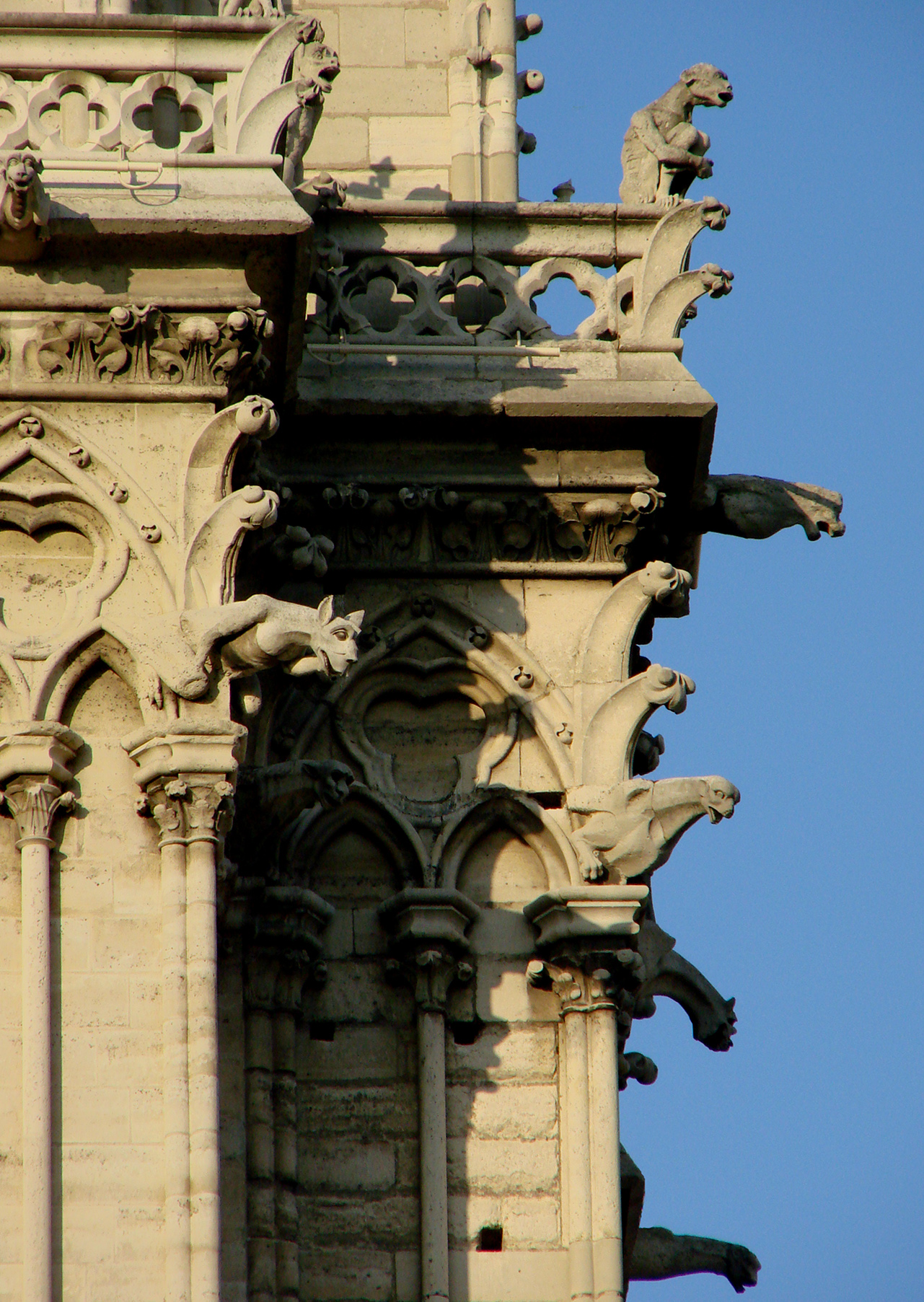 Chimères de la cathédrale Notre-Dame de Paris (côté Sud), datant de la restauration dirigée par Viollet-le-Duc au 19ème siècle.